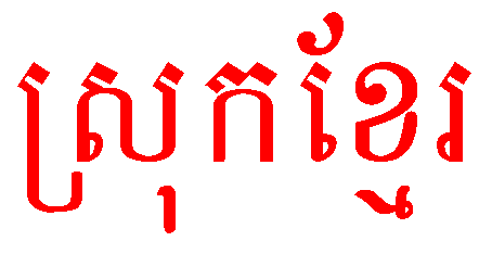 Der Landesname Kambodscha (= Khmer) in Khmer-Schrift